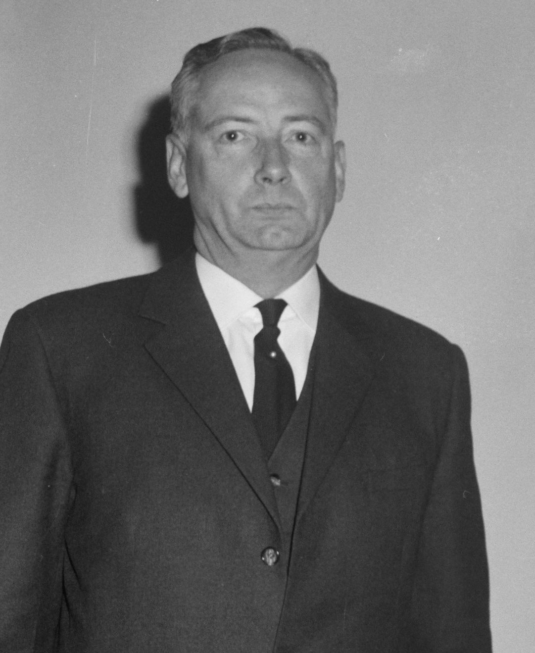 Collectie / Archief : Fotocollectie Anefo Reportage / Serie : [ onbekend ] Beschrijving : Zilveren "Oisterwijk Shoe Design Cup" in Hilton Hotel uitgereikt aan dhr. Zanlari Cavalca uit Parma door burgemeester Baron van Hoevell van Wezeveld en Datum : 21 oktober 1963 Instellingsnaam : Hilton Hotel Fotograaf : Bilsen, Joop van / Anefo Auteursrechthebbende : Nationaal Archief Materiaalsoort : Negatief (zwart/wit) Nummer archiefinventaris : bekijk toegang 2.24.01.04 Bestanddeelnummer : 915-6539